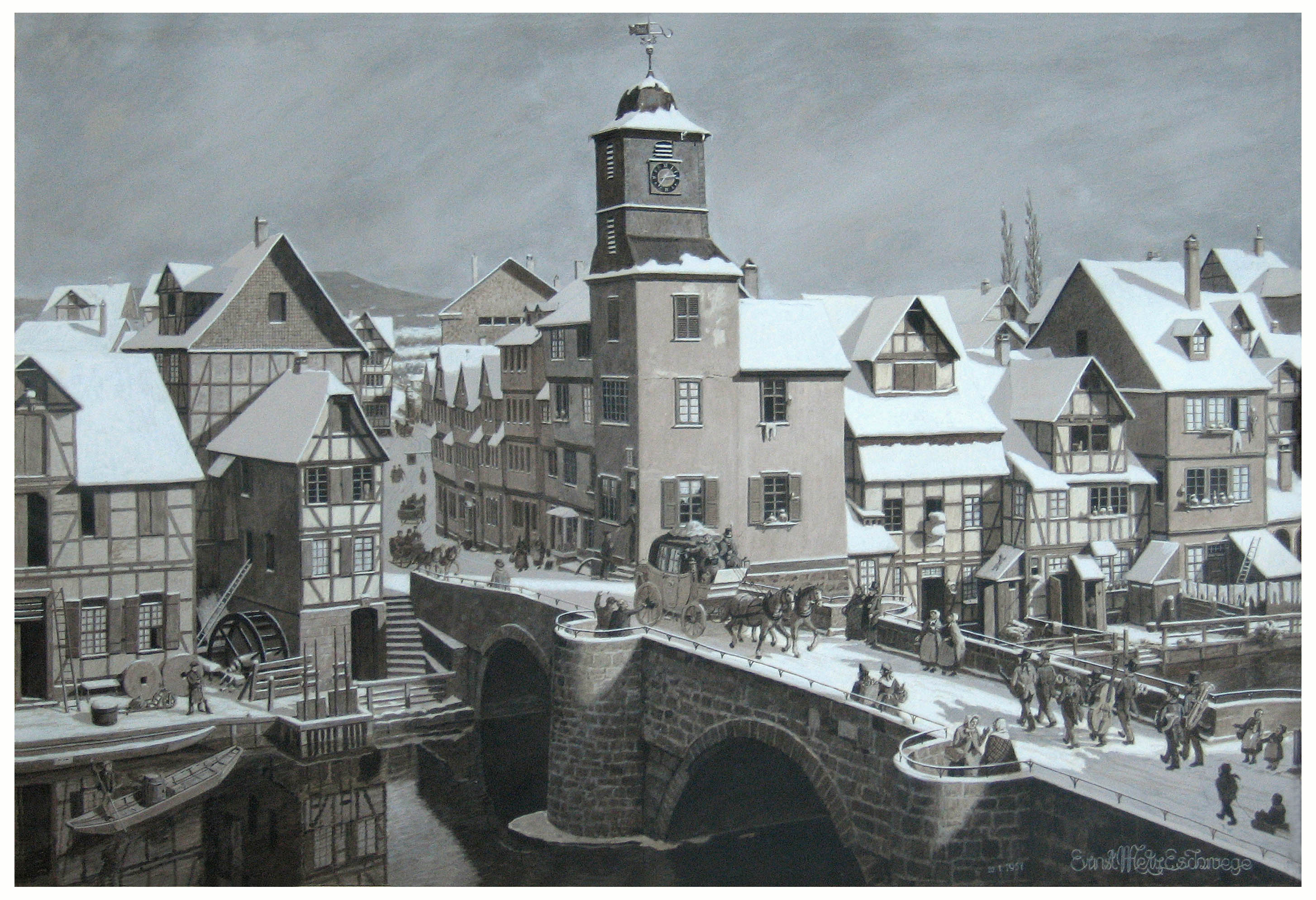 Gouache, 1951